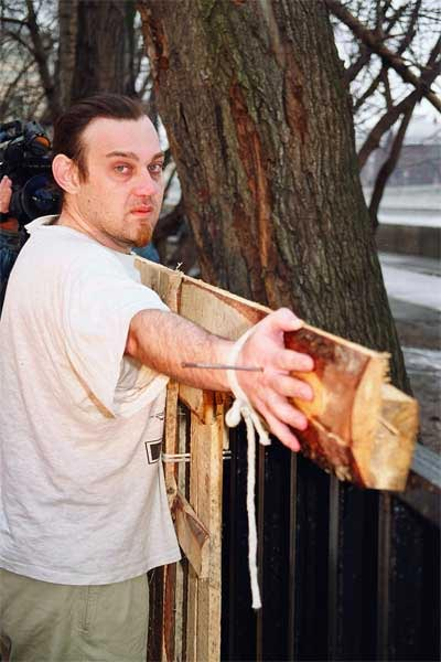 Акция Олега Мавроматти «Не верь глазам».